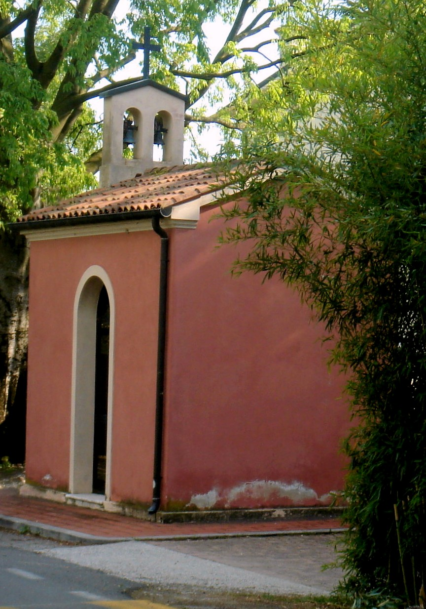 Collalbrigo (Conegliano, Treviso, Italia): capitello di Sant'Anna in via Guizza.